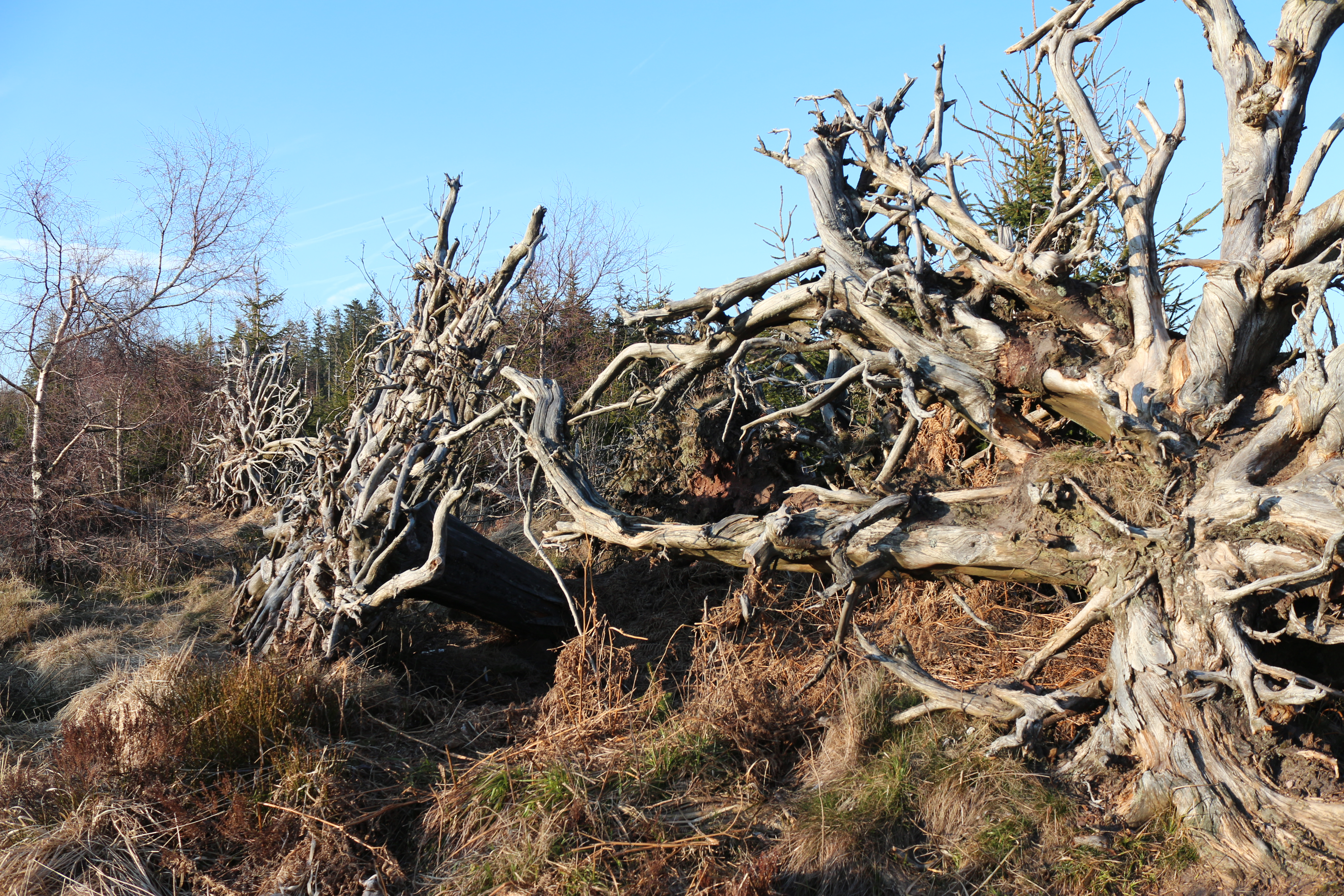 Im Dezember 1999 wütete der Orkan "Lothar" auch über dem Nordschwarzwald und richtete verheerende Schäden an die bis heute sichtbar sind. Die Aufnahme entsatnd auf dem von der Forstverwaltung eingereichteten "Lotharpfad" auf dem noch heute die Schäden zu besichtigen sind.